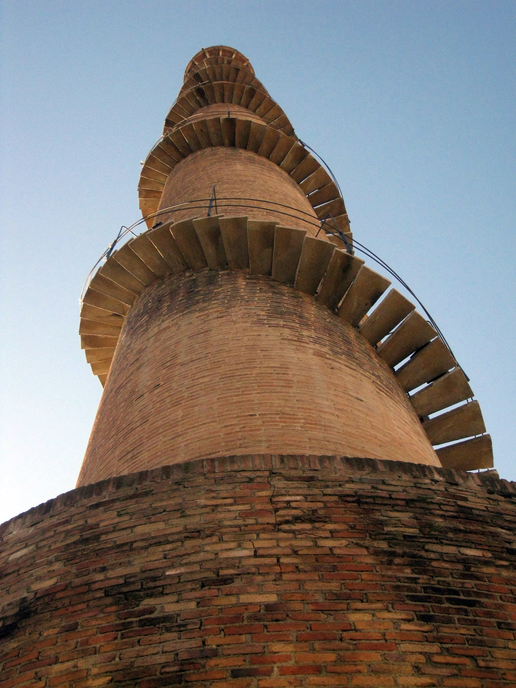 Detall de la xemeneia de la bòbila Almirall, a Terrassa. S'aixeca a la plaça de l'Assemblea de Catalunya, urbanitzada modernament a l'espai que ocupava l'antiga fàbrica, de la qual només es conserva la xemeneia. En destaca l'escala de cargol.